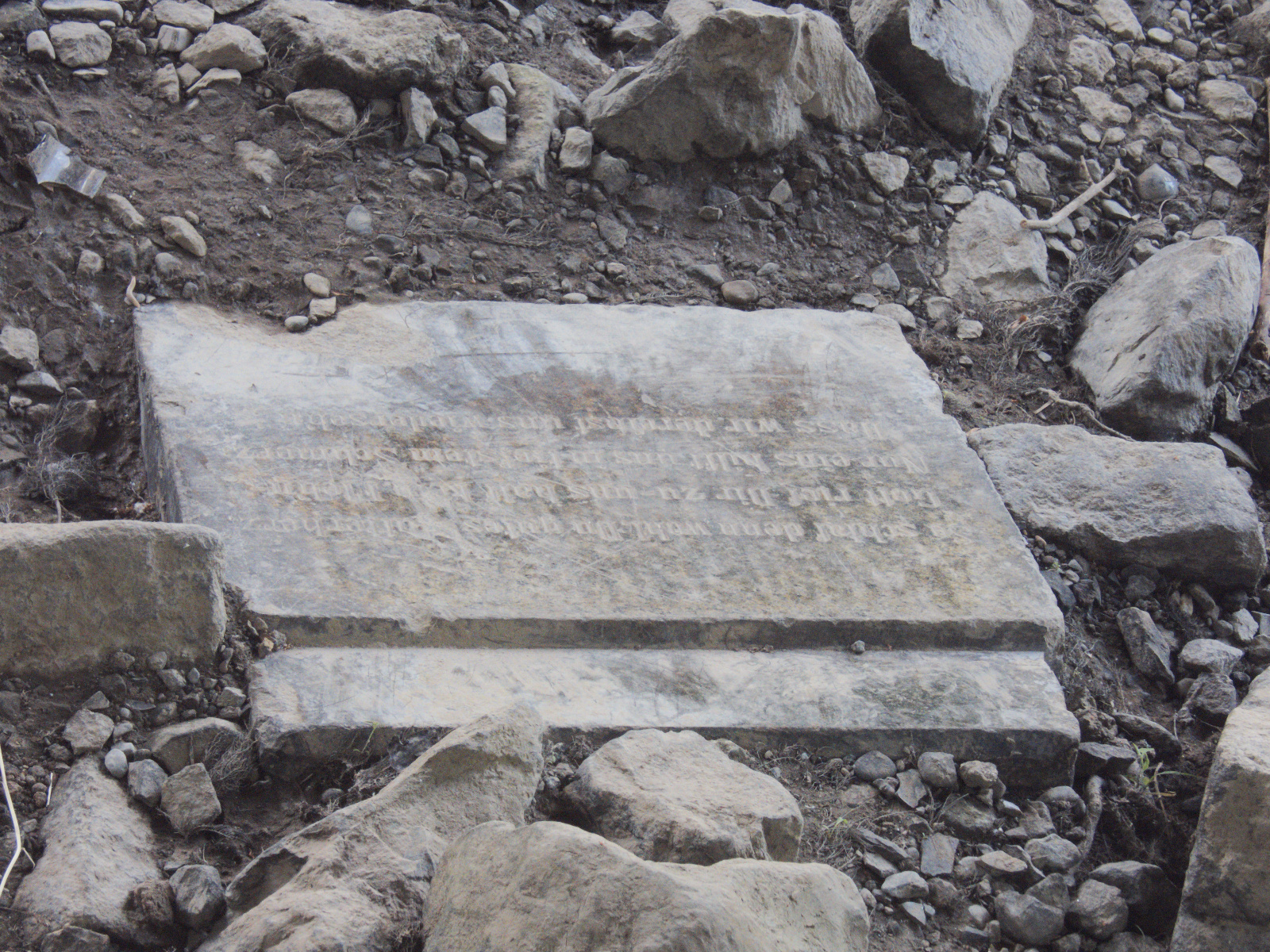 Unter der Klappenburgbrücke liegen auch Grabsteine in der Leine